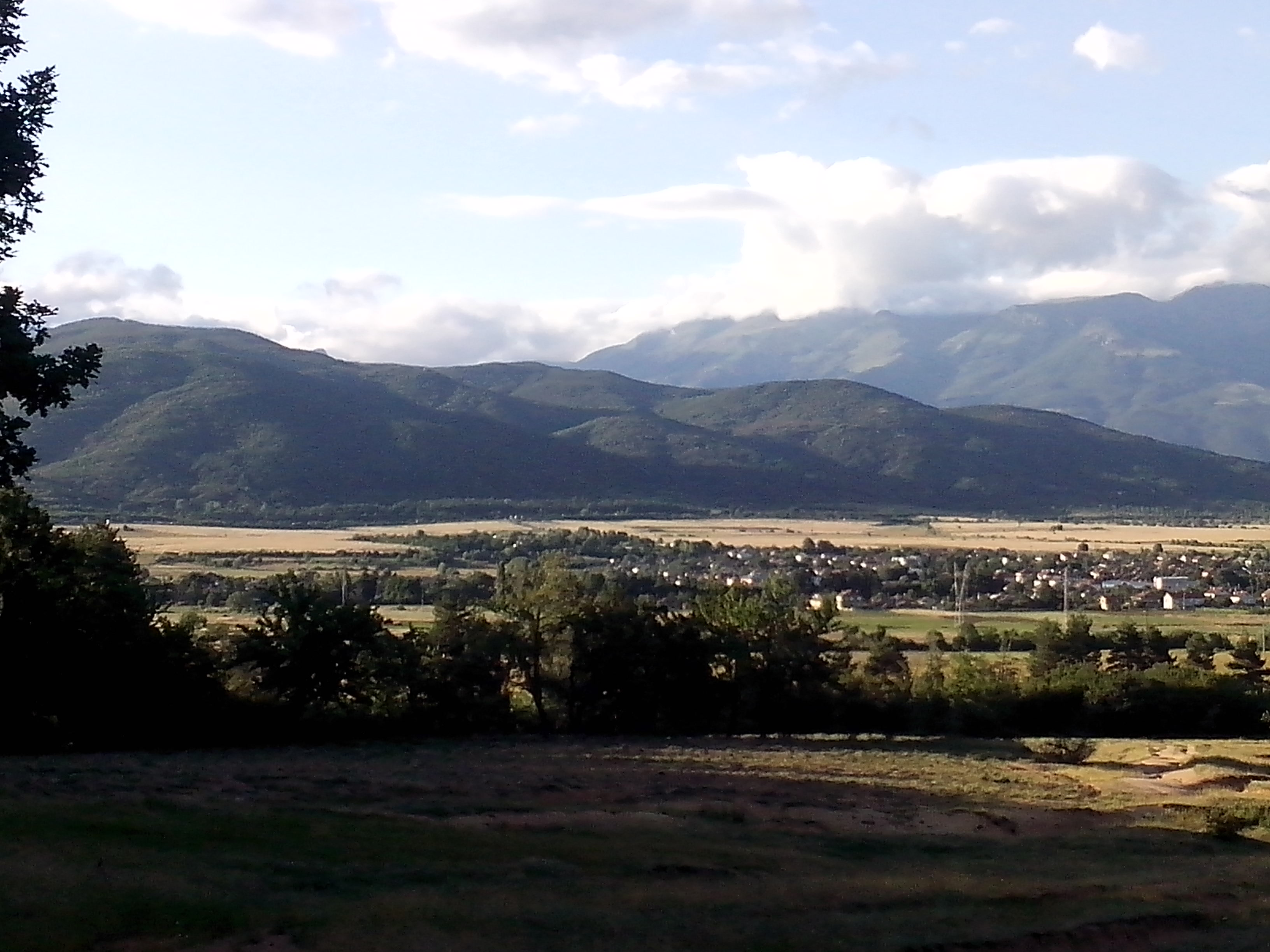 Неповторим летен живопис на "Централен Балкан" от височините на с. Осетеново. Зад ниския старопланински масив се извисяват връх Марагидик и масива Триглав